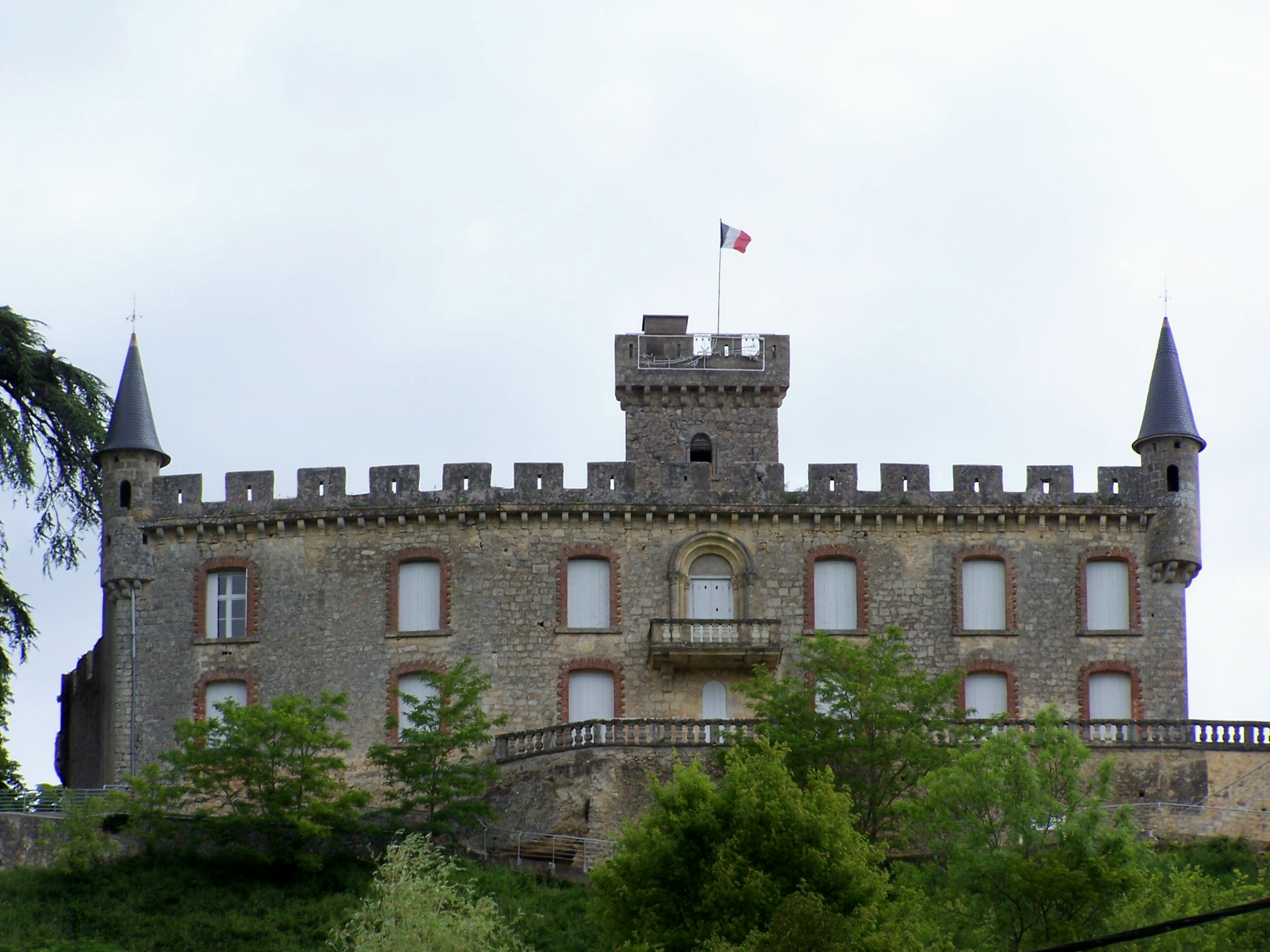 Château-mairie de Sainte-Croix-du-Mont, Gironde, France